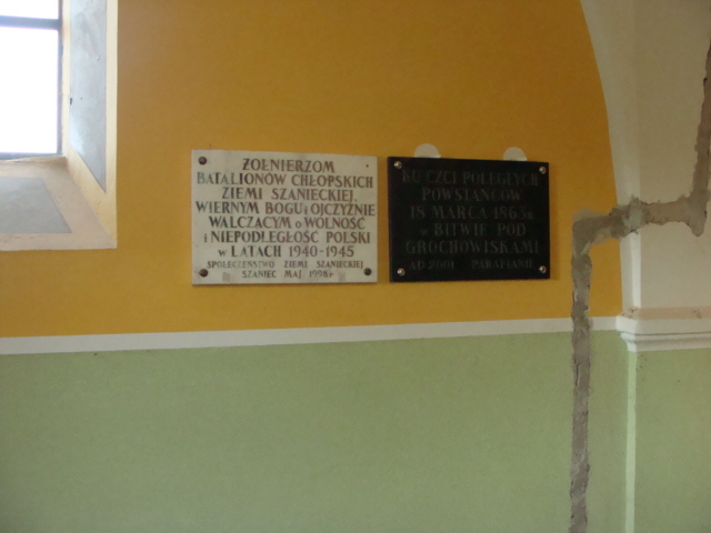 Szaniec Tablica Bataliony Chłopskie